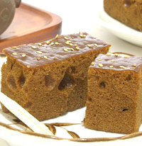 黑糖糕